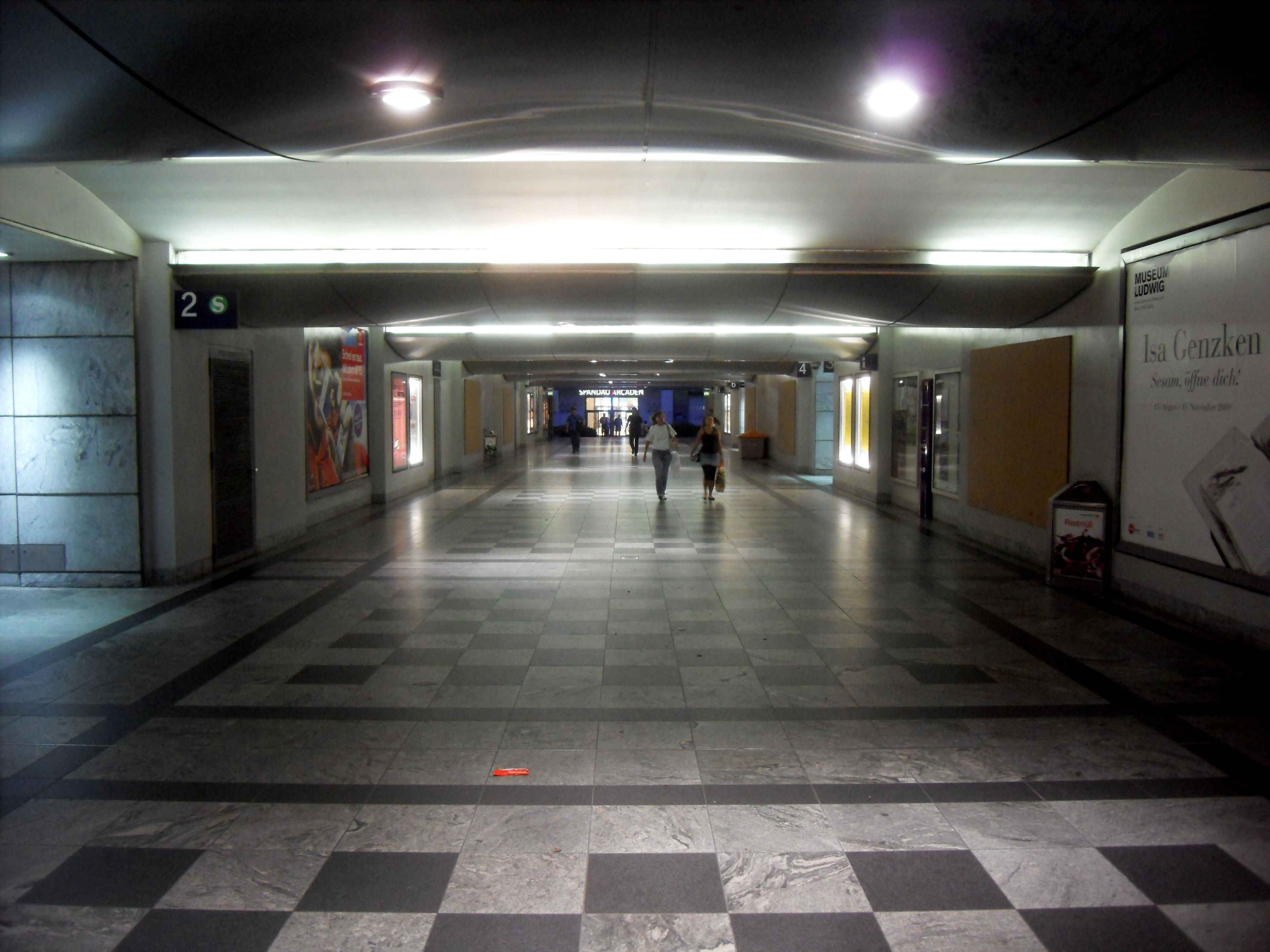 Die Unterführung des Bahnhofs Berlin-Spandau in Deutschland, von Gleis 1 nach Gleis 6 blickend